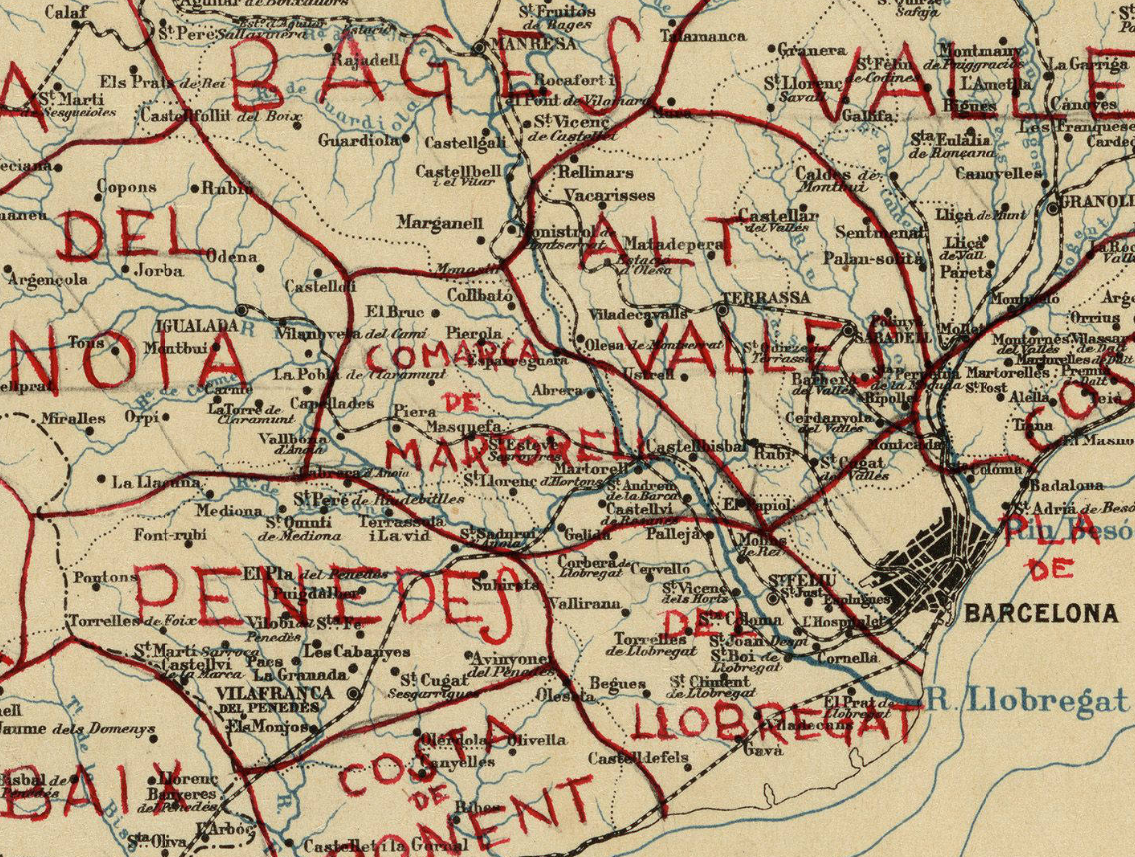 [Fragment] Divisió comarcal per a Federacions Agricoles: segons projecte de J. M. Rendé i fet per la Mancomunitat de Catalunya. Any MCMXXIV / dt. per V. Turell Font: Institut Cartogràfic i Geològic de Catalunya